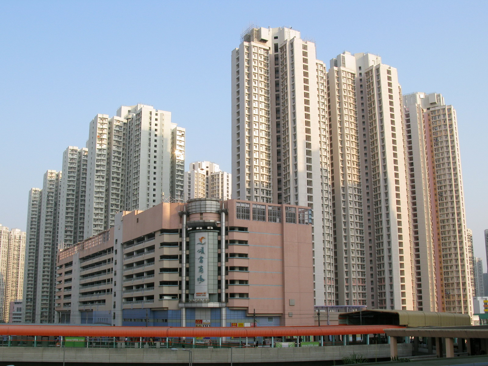 天頌苑 Tin Chung Court